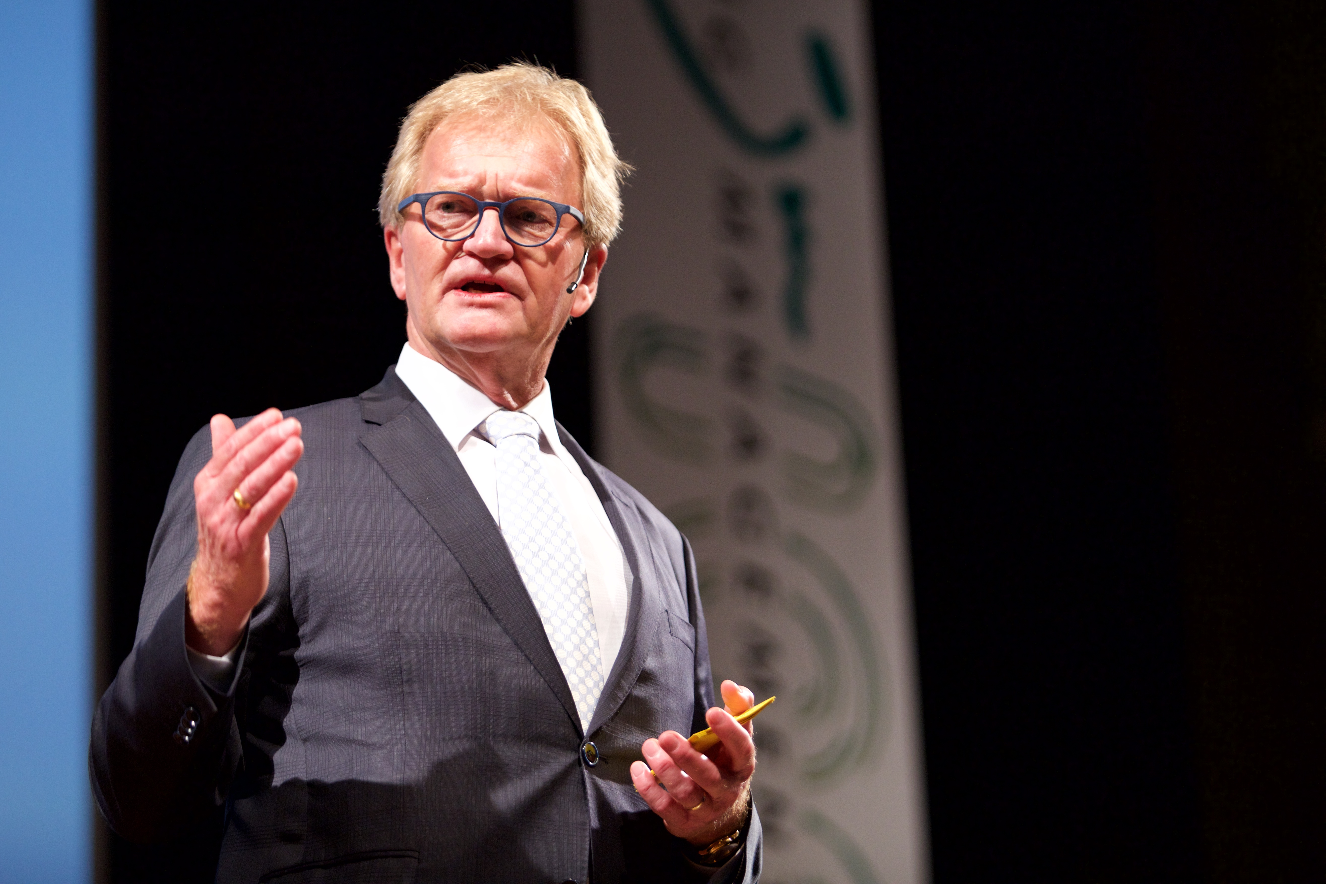 Op 10 juni 2016 vierde Jong Management haar 100 jarig jubileum in het Koninklijk Instituut Tropen in Amsterdam. Jong Management begon in 1916 als de Vereniging voor Toekomstige Katholieke Werkgevers. Nu is het uitgegroeid tot de grootste vereniging voor jonge werkgevers van Nederland. Anno 2016 komen de circa 1.000 leden van de vereniging maandelijks bijeen om elkaar te inspireren, uit te dagen, en van elkaar te leren.